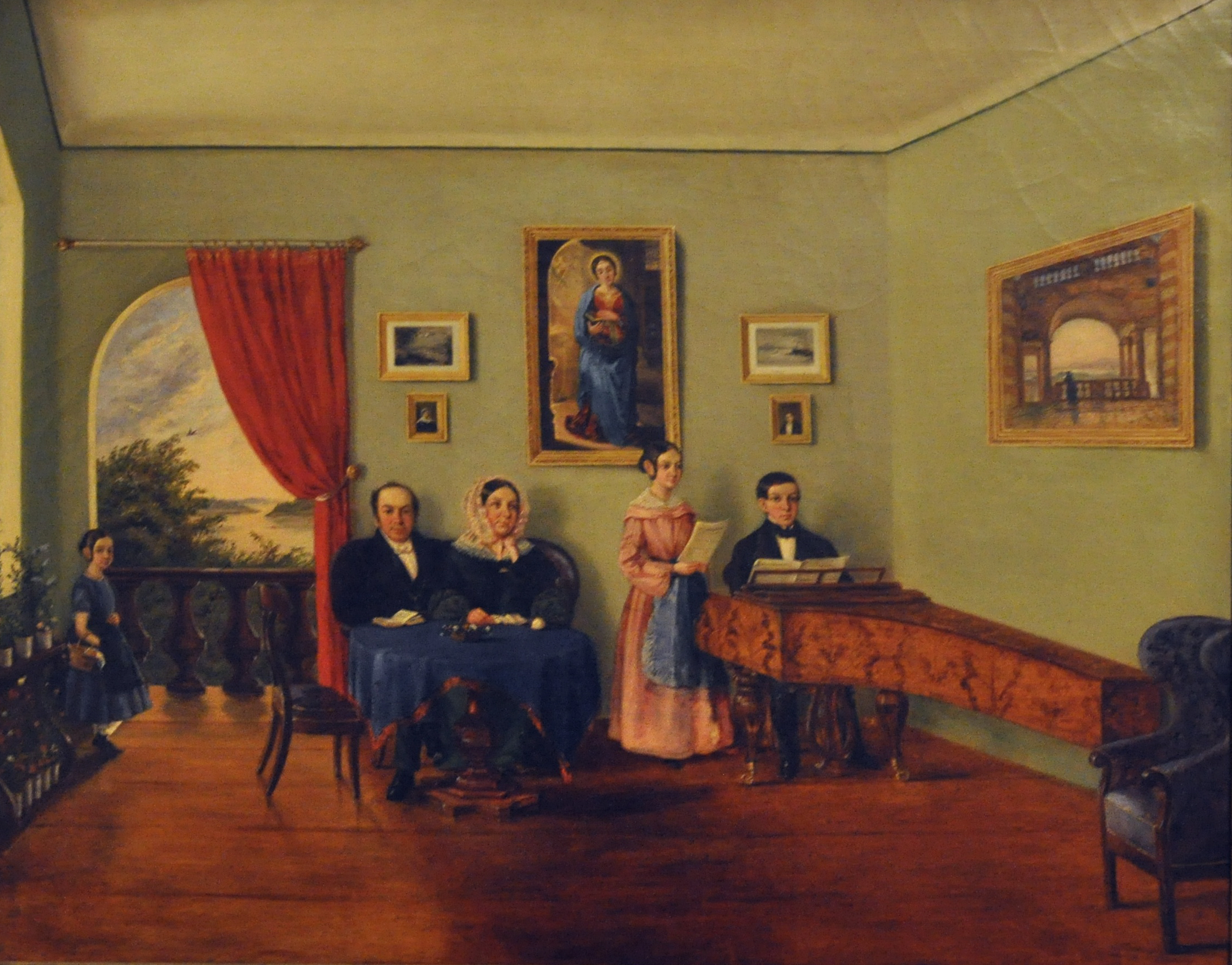 Michael Leitermayer im Kreise seiner Familie, um 1840 (Michael Leitermayer, Freund Franz Schuberts, Organist der Minoritenkirche in der Alserstraße; neben dem Vorhang sitzend) Leihgabe des Wien-Museums, Inv. Nr. 37.203 Ausgestellt in: Wien, Kunsthistorisches Museum, Sammlung alter Musikinstrumente (Neue Burg)